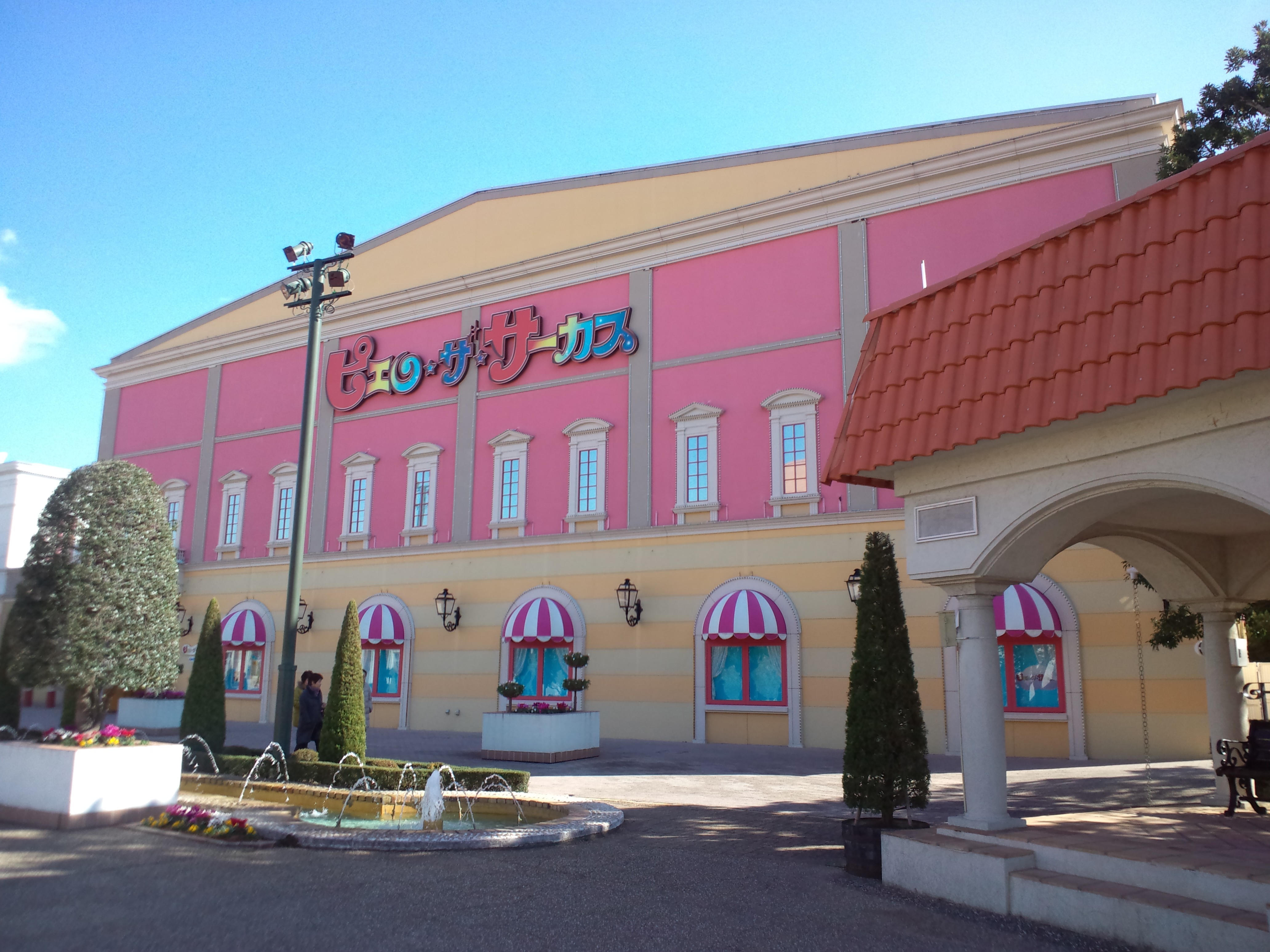 志摩スペイン村、パルケエスパーニャ ピエロ・ザ・サーカス